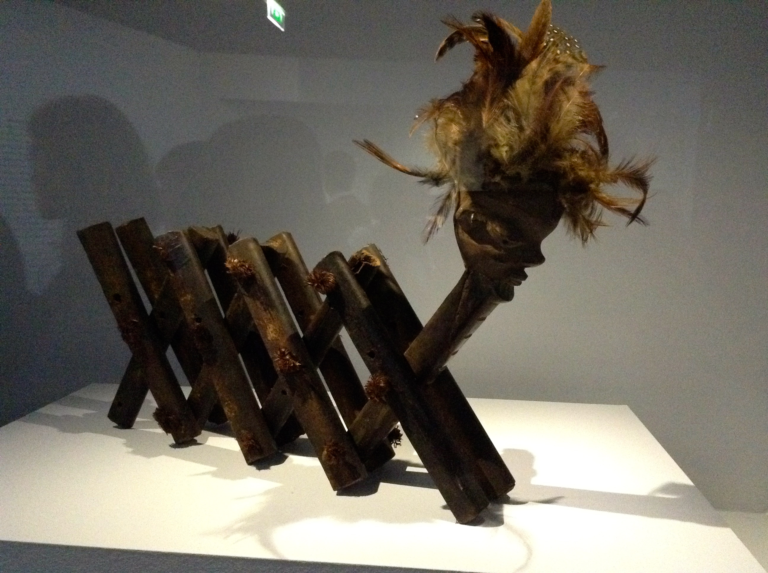 Accordéon divinatoire Pende Congo (1920-1950) Bois, plumes, patine